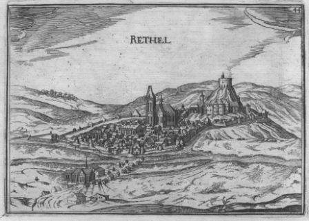 dans le document Gouvernement de champagne, des gravures qui étaient la possession de Davanne-Chappier avec comme notation 1499-1892, la vue n° 44 de la ville de Rethel.